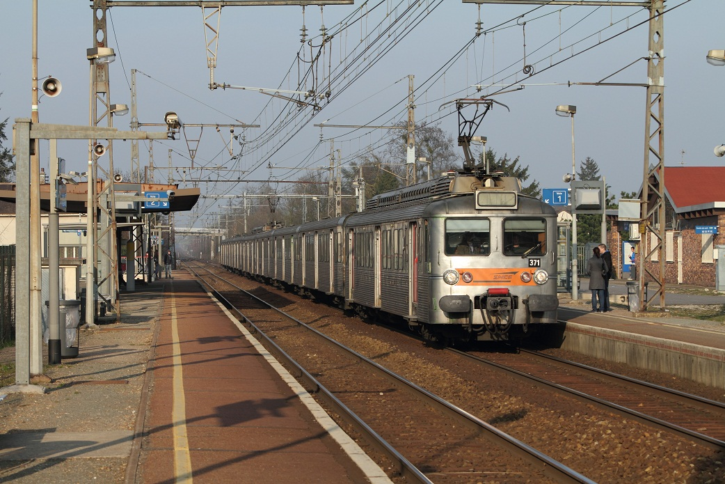 La Z 5371 en gare des Essarts-le-Roi assurant un train en direction de Rambouillet en Mars 2011, Yvelines, France.